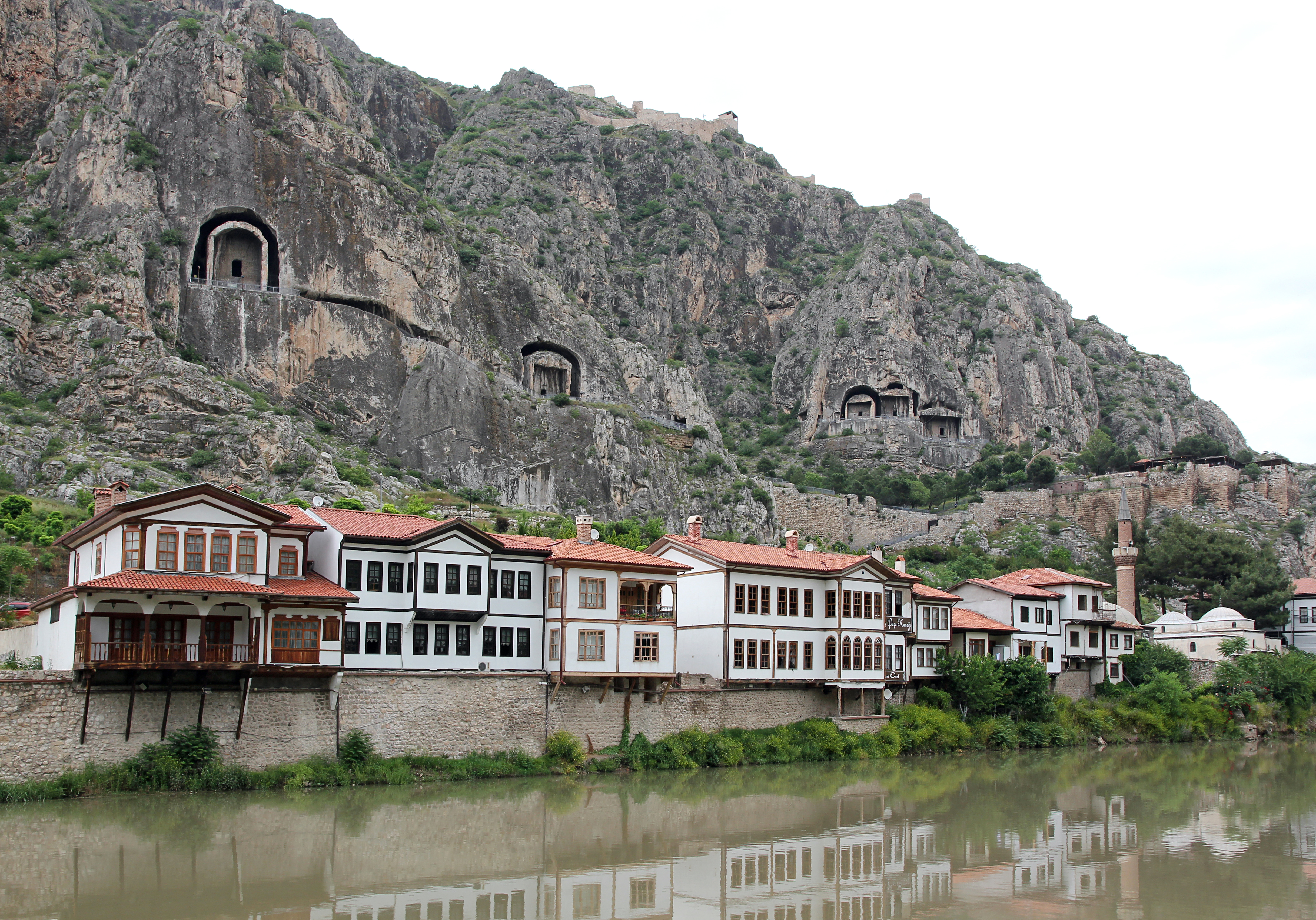 Amasya, Nordtürkei